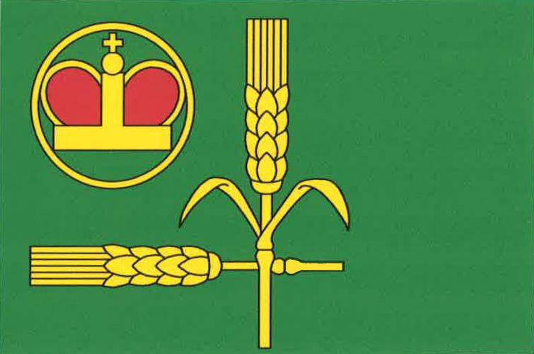 Jeníkov vlajka